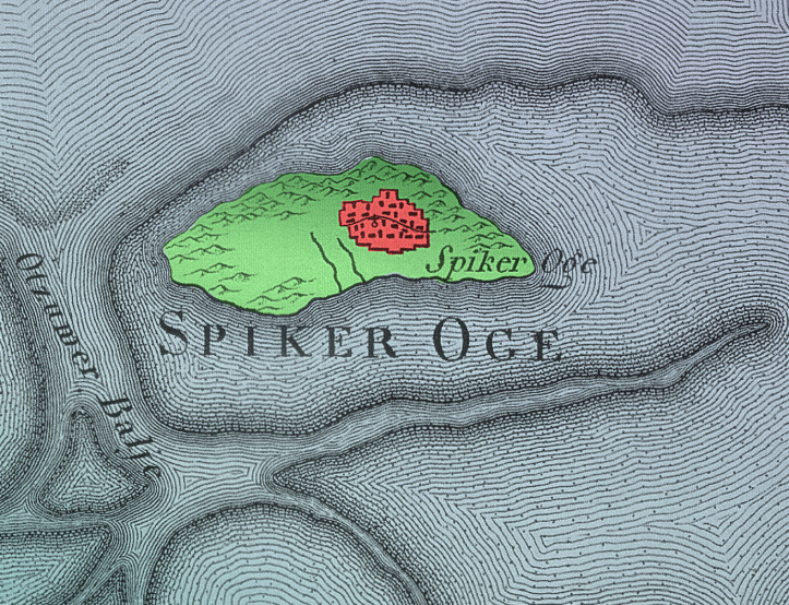 Bearbeiteter Ausschnitt Spiekeroog und Otzumer Balje aus Karl Ludwig von Le Coqs Werk Topographische Karte in 22 Blättern den größten Theil von Westphalen enthaltend, so wie auch das Herzogthum Westphalen und einen Theil der hannövrischen, braunschweigischen u. heßischen Länder ; nach astronomischen und trigonometrischen Ortsbestimmungen / hrsg. vom General-Major von LeCoq im Jahr 1805. Gest. von Carl Jäck (u. a.). - Berlin, ca. 1805. Digitalisierte Ausgabe der Universitäts- und Landesbibliothek Düsseldorf